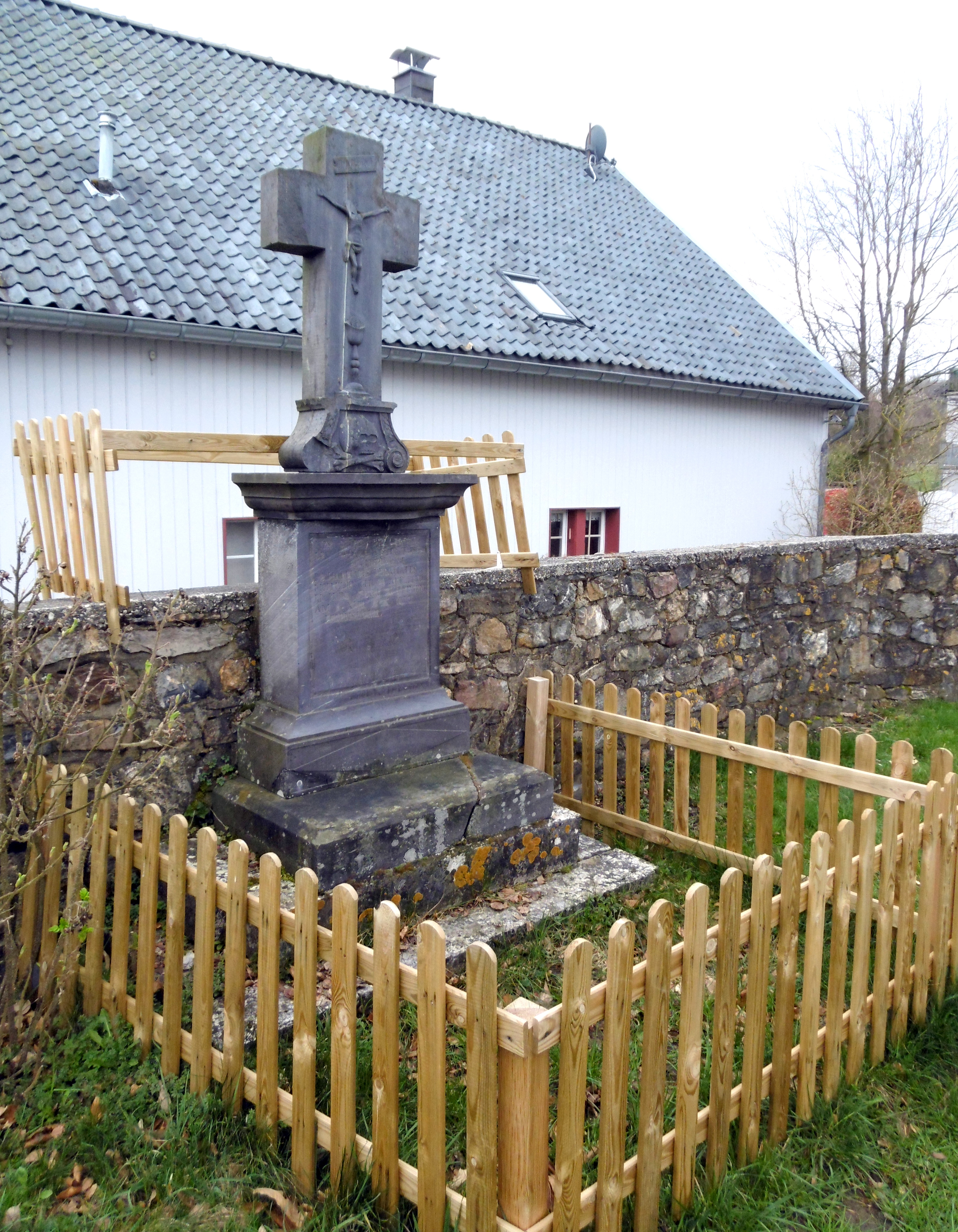 Marienkapelle Roetgen, Grabstätte Dechant Thelen